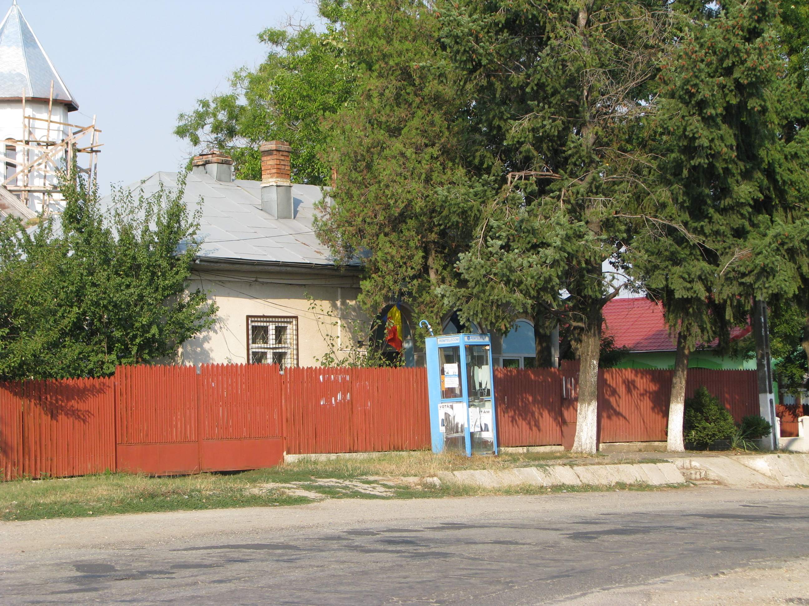 Vechea primărie, azi secție de Poliție, sat Bucșani, județul Giurgiu